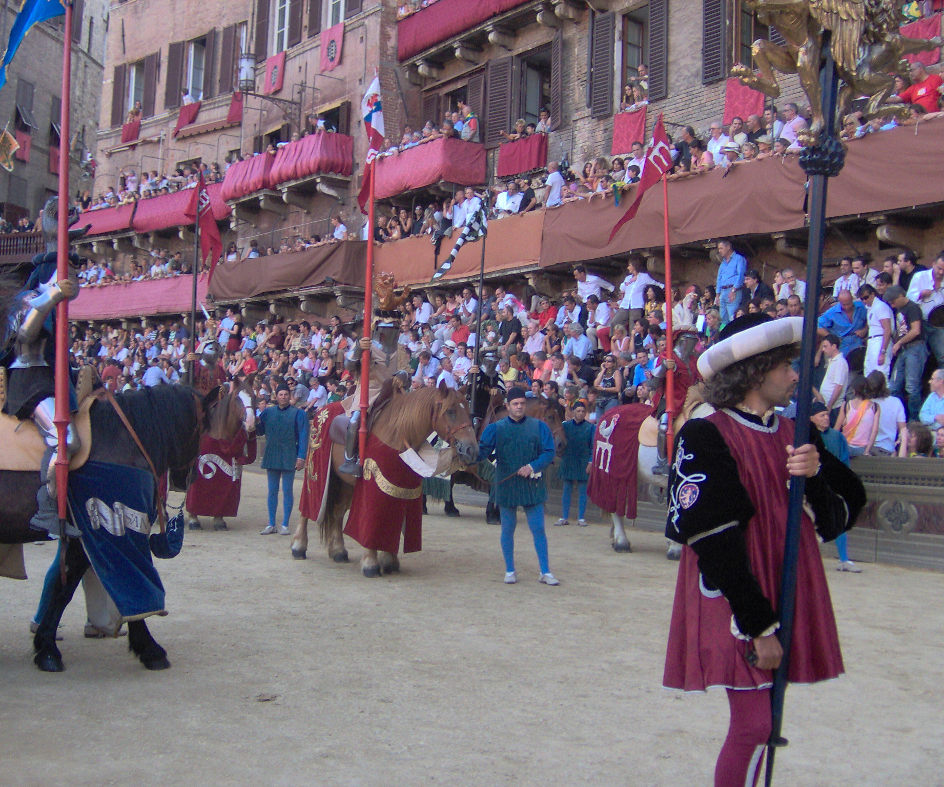 Image del corte del Palio di Siena - agosto 2006